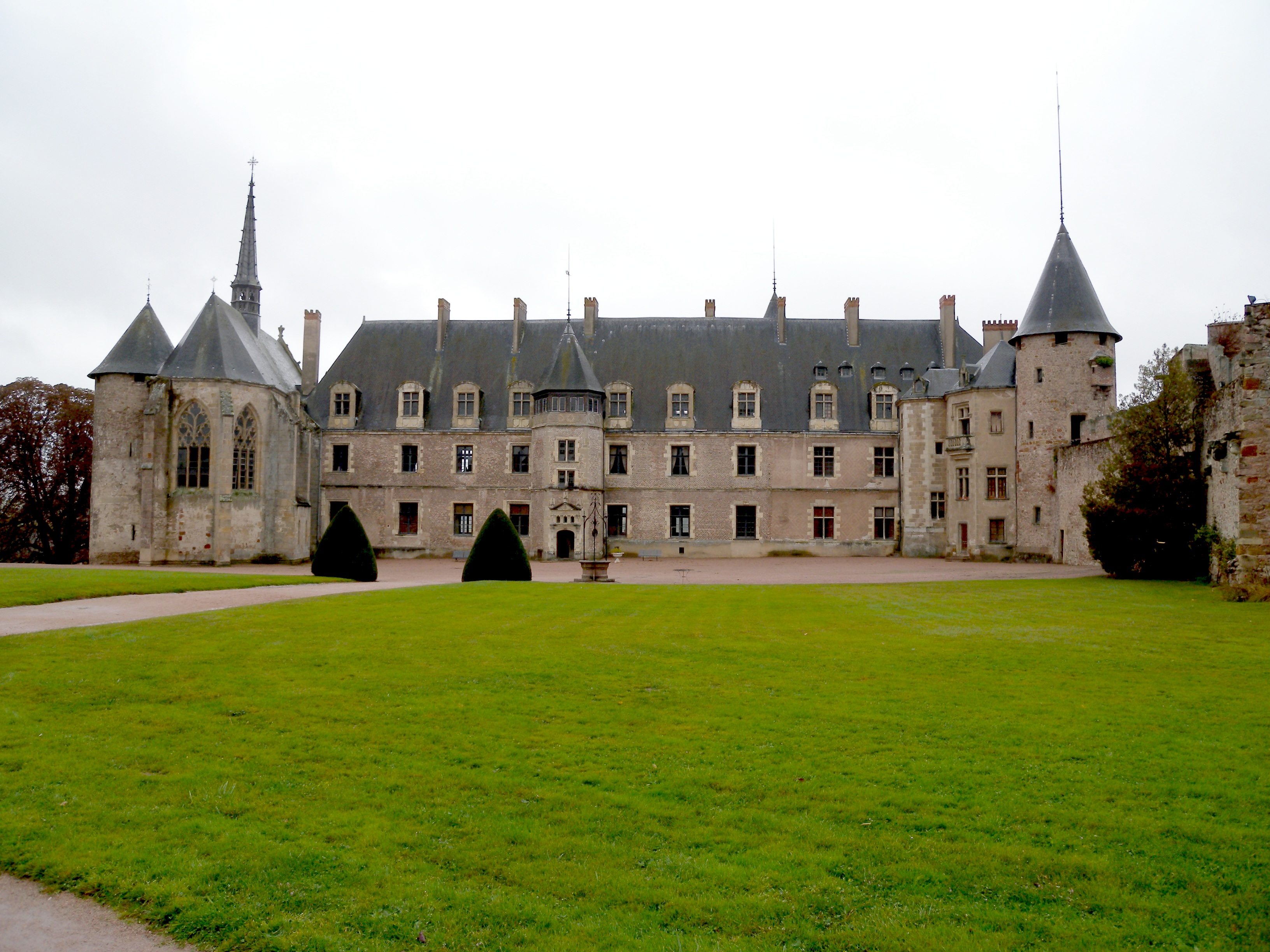 Château de Lapalisse, Allier, France